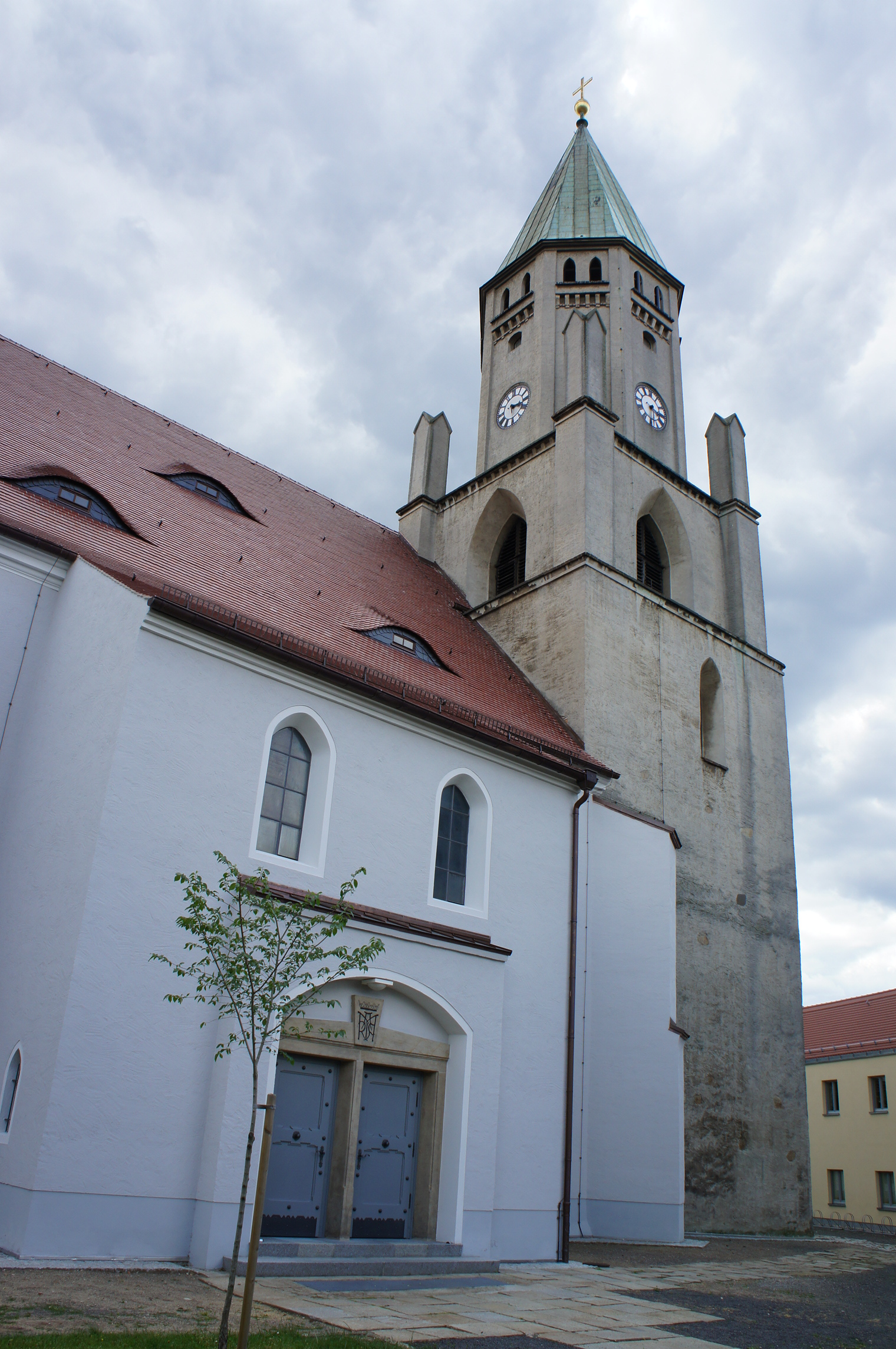 Katoholische Pfarrkirche "St. Mariä Himmelfahrt" in Wittichenau. Bereits um 1000 soll eine Holzkirche existiert haben, sie wurde 1230 ersetzt, 1429 durch die Hussiten zerstört, dann wieder aufgebaut bis 1440. Danach immer wieder Reparaturen und Erweiterungen, der letzte größere Eingriff in die dreischiffige Hallenkirche erfolgte 1971/72, bei der die Emporeneinbauten, mit Ausnahme der Orgelempore, entfernt wurden. Nordportal